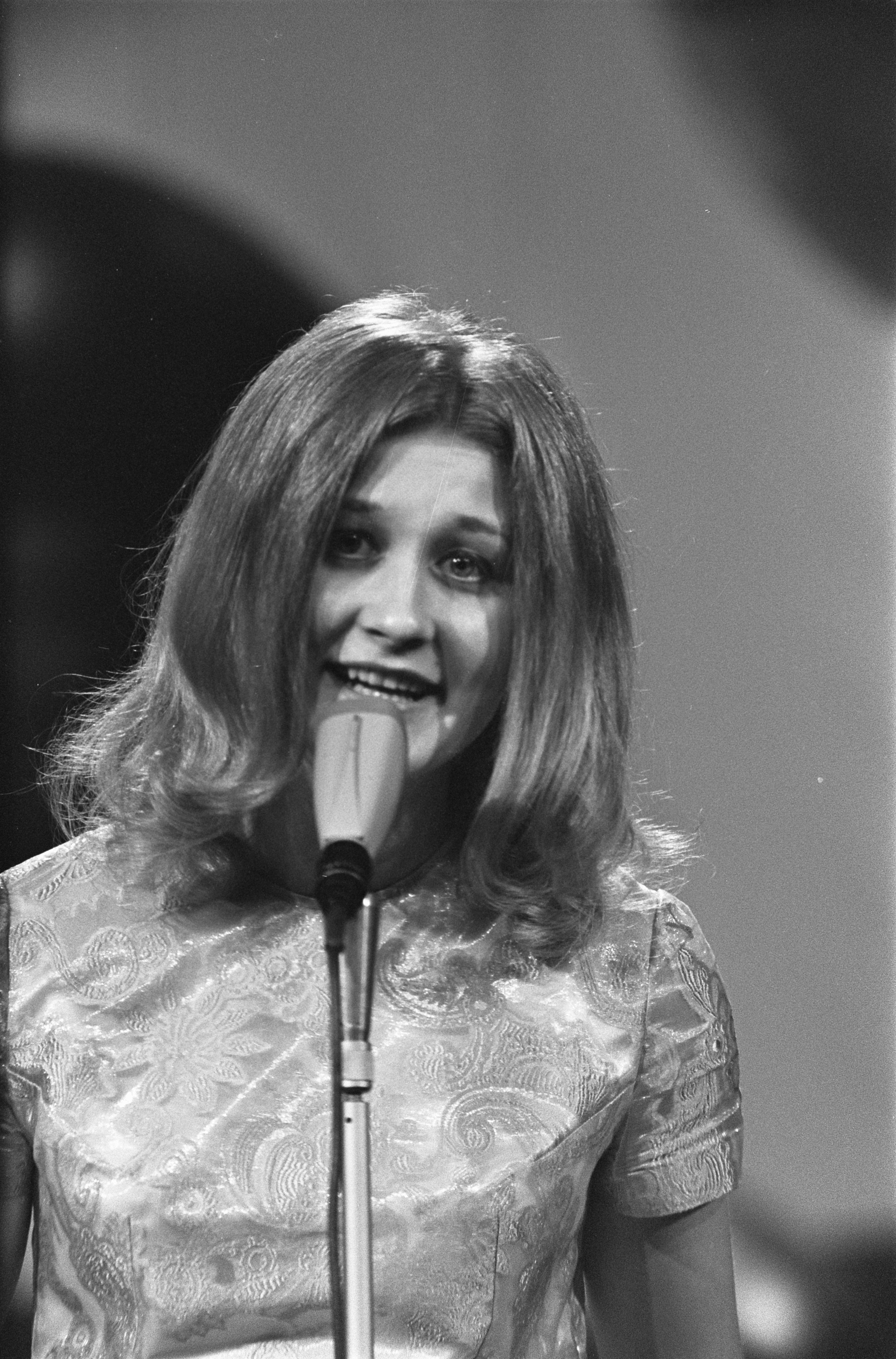 Collectie / Archief : Fotocollectie Anefo Reportage / Serie : Eurovisie Songfestival 1970 in RAI te Amsterdam Beschrijving : Eurovisie Song Festival 1970 in RAI Amsterdam. Eva Sršen (Joegoslavie) Datum : 21 maart 1970 Locatie : Amsterdam Trefwoorden : artiesten, songfestivals, zangers Persoonsnaam : Sršen, Eva Instellingsnaam : Eurovisie Song Festival Fotograaf : Koch, Eric / Anefo Auteursrechthebbende : Nationaal Archief Materiaalsoort : Negatief (zwart/wit) Nummer archiefinventaris : bekijk toegang 2.24.01.05 Bestanddeelnummer : 923-3709